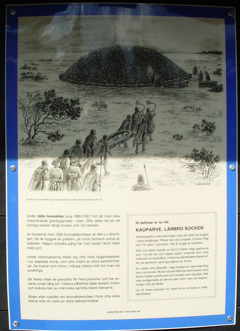 Gotland, Infotafel zum Hügelgrab Kauparve (Ort:Gemeinde Lärbro).